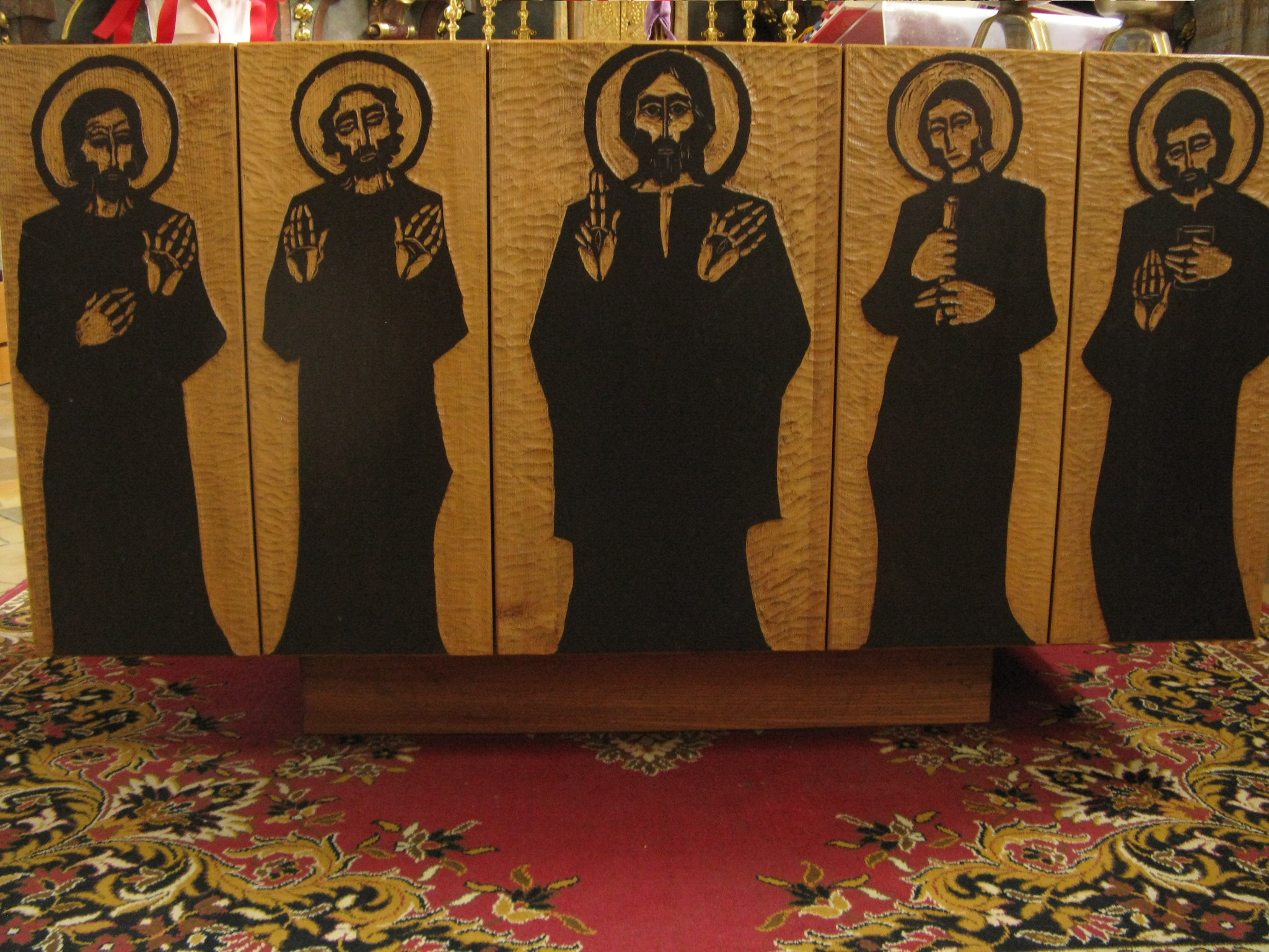 Altartisch der Pfarrkirche Pottschach, gestaltet von Prof. Robert Hammersiel, der in Pottschach lebt.